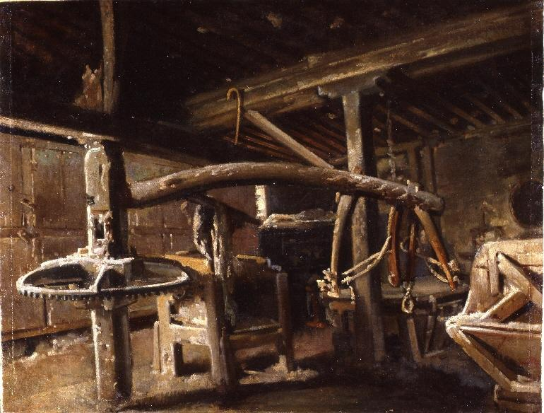 Fábrica de masa y tahona en el Pósito de Madrid, óleo sobre lienzo, 46 x 60 cm, Madrid, Museo de Historia de Madrid